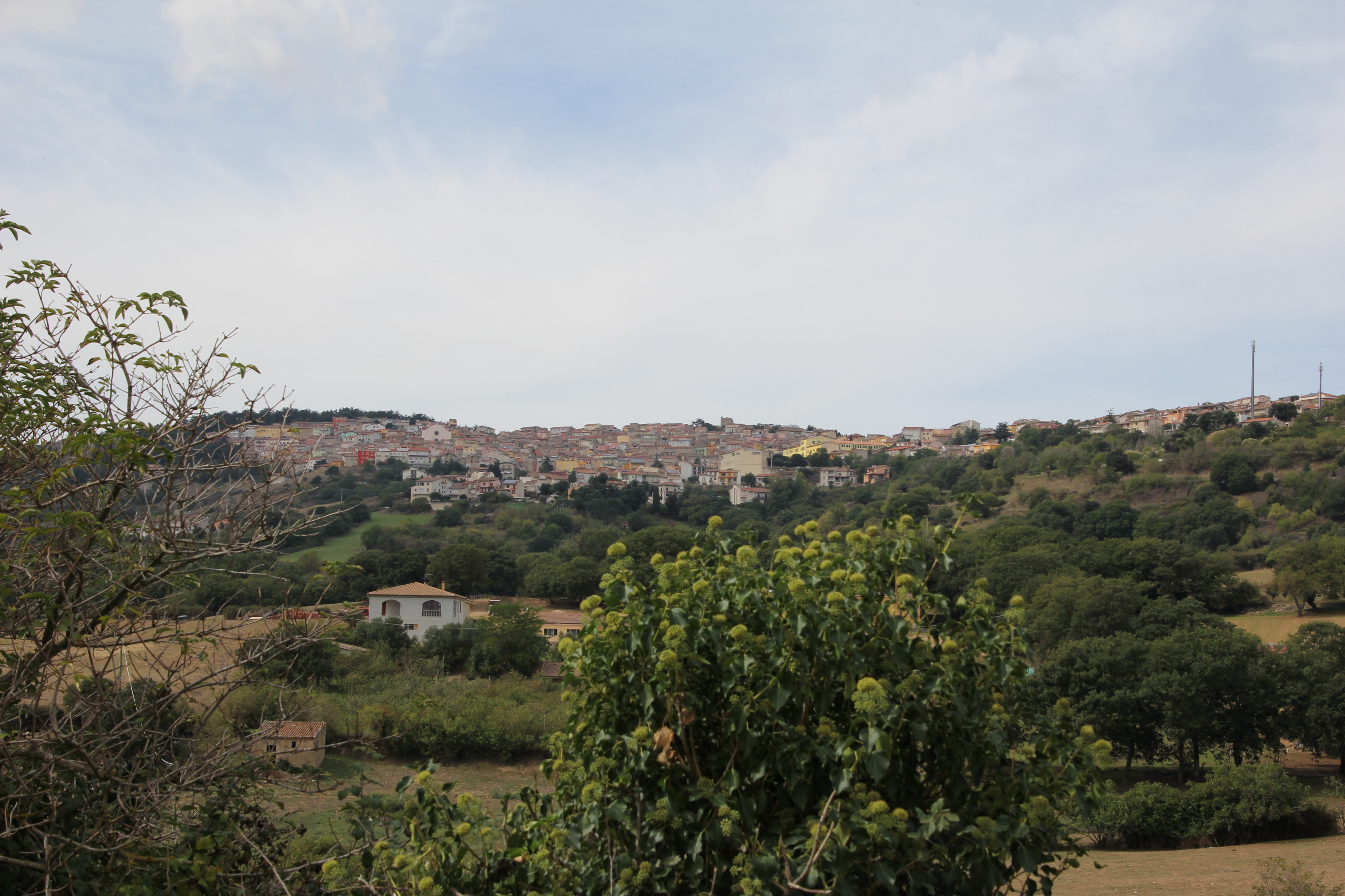 Pattada - Panorama